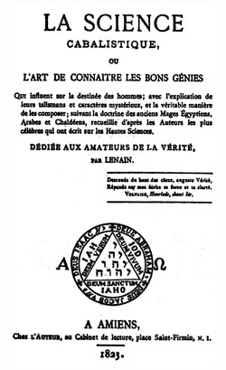 Каббалистическая наука (La Science Cabalistique, ou l'art de comaitre les bons Genies) Ленена была написана в 1823 году. Печатное издание этой работы вышло во Франции благодаря Папюсу.